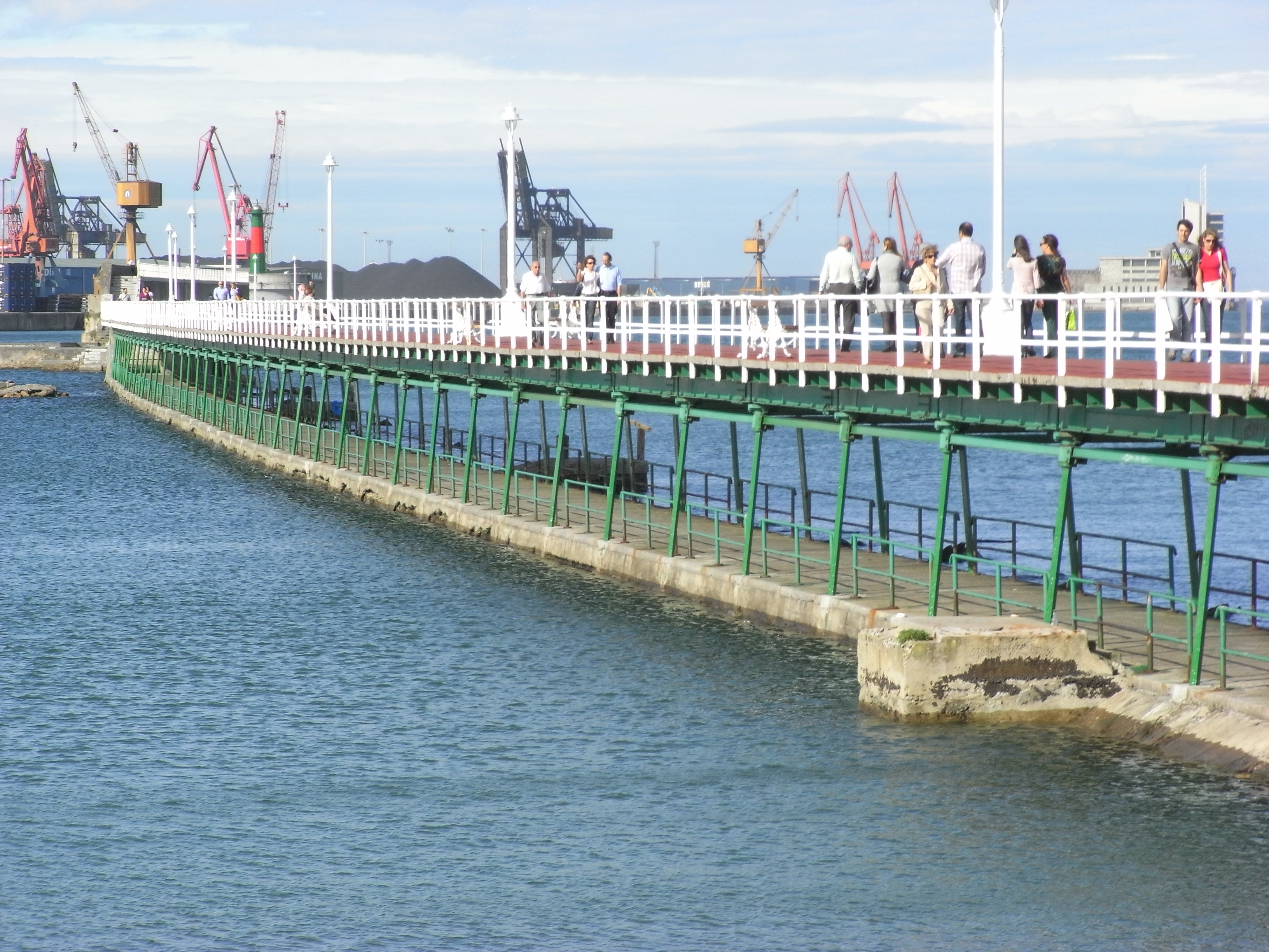 El muelle en noviembre de 2009, una vez eliminado de los pilotes el recubrimiento de hormigón que los ocultó a la vista durante 75 años.